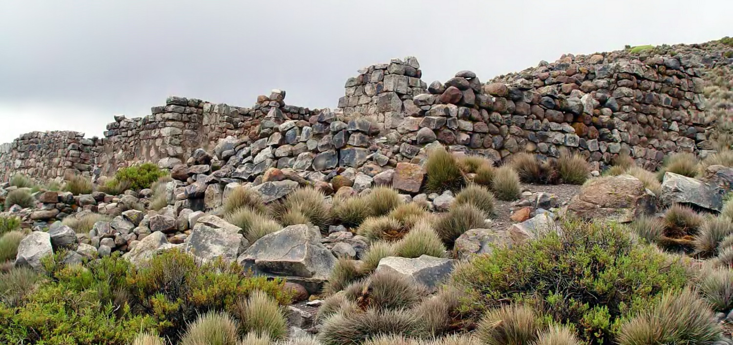 Tambo de Chungará This is a photo of a national monument in Chile: 265